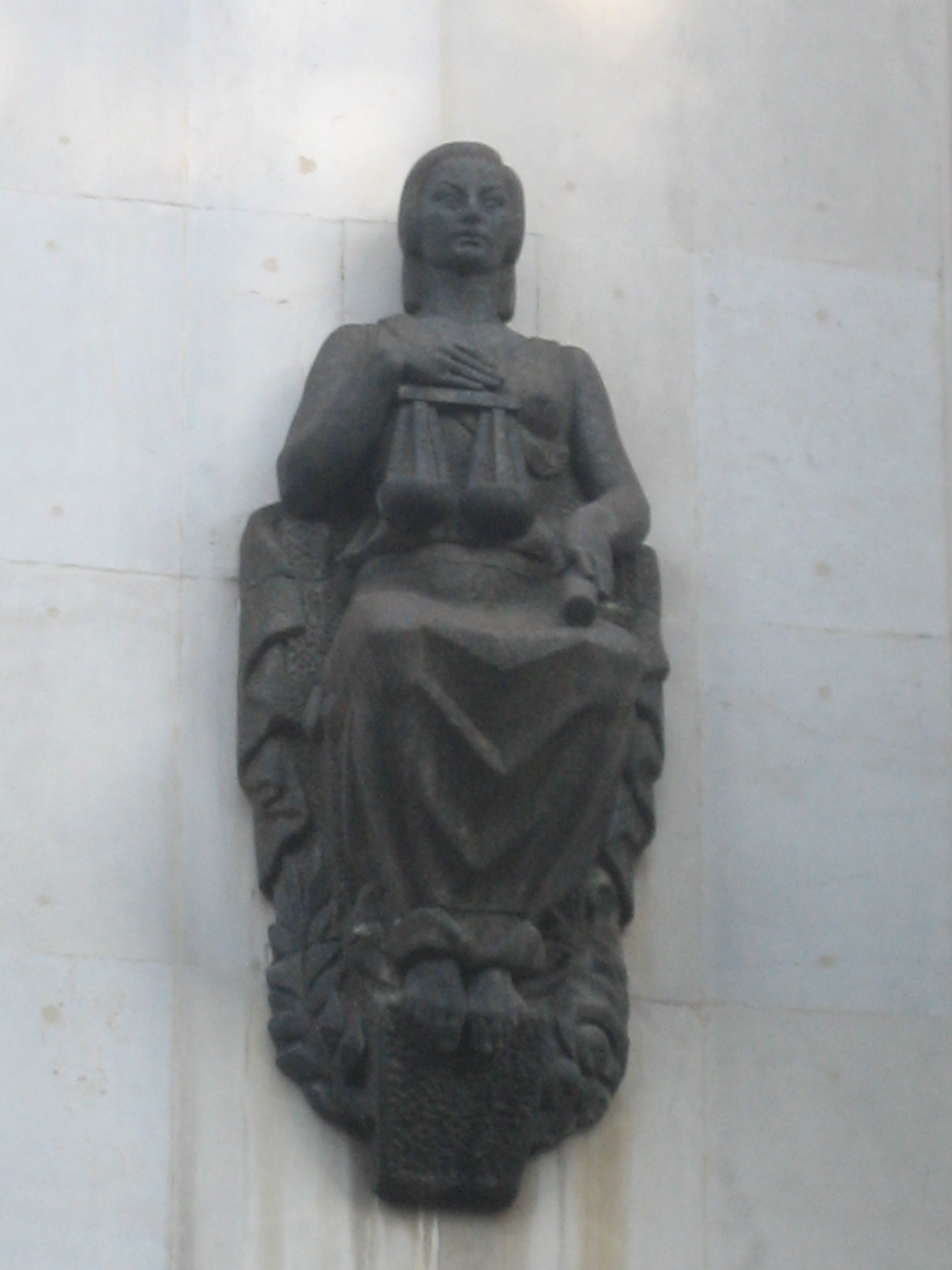 Alegoría de la Justicia, en el edificio de la Equitativa, en Bilbao, obra de Joaquín Lucarini